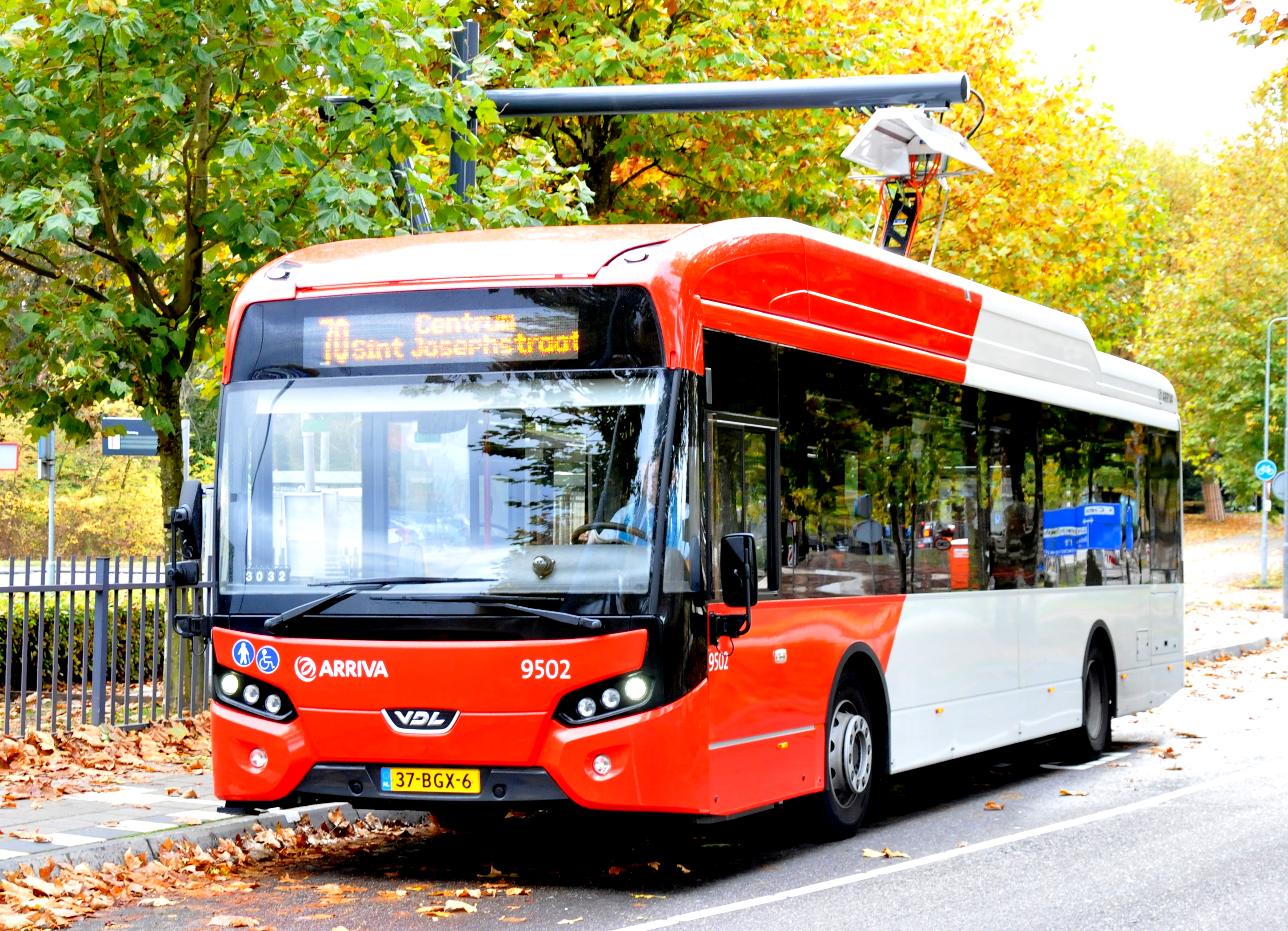 Arriva bus 9502 van het VDL type Citea SLF 120/Electric (bj: 2016) bij P+R halte De Vliert te 's-Hertogenbosch.